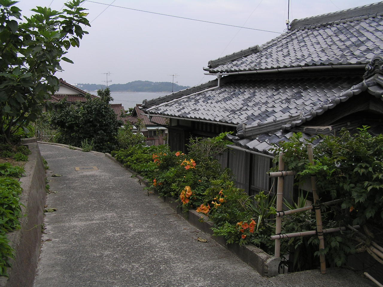 Kashira island in Bizen, Okayama,Japan